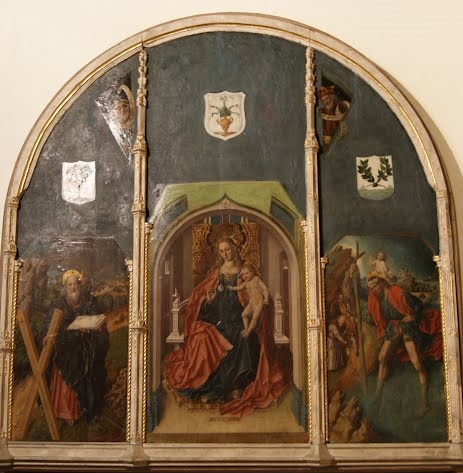 La tabla central del Tríptico de la Virgen de la Rosa, en la que aparece la Virgen María junto a su hijo, el Niño Jesús, está firmada por Fernando Gallego, y en las laterales aparecen San Andrés Apóstol y San Cristóbal, debiendo haber sido realizado todo el conjunto hacia el año 1480 y constituyendo una de las obras maestras de su autor.